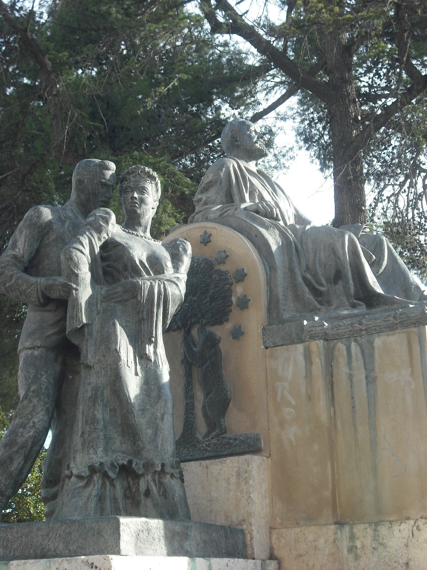 Grupo escultórico inspirado en la zarzuela "La Revoltosa", parte del Monumento a Ruperto Chapí de Villena.